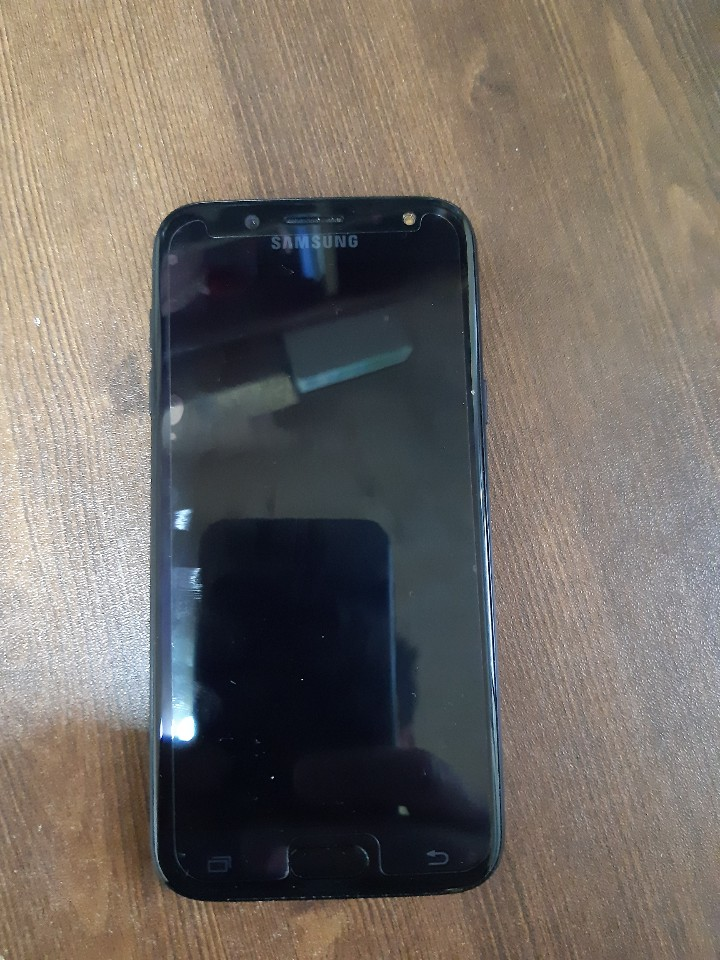 삼성 갤럭시 J5(2017)